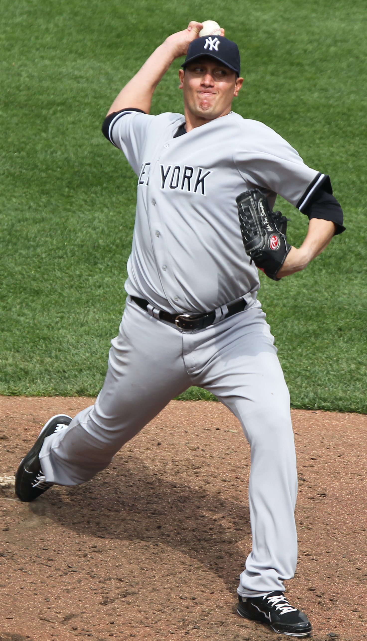 Freddy García